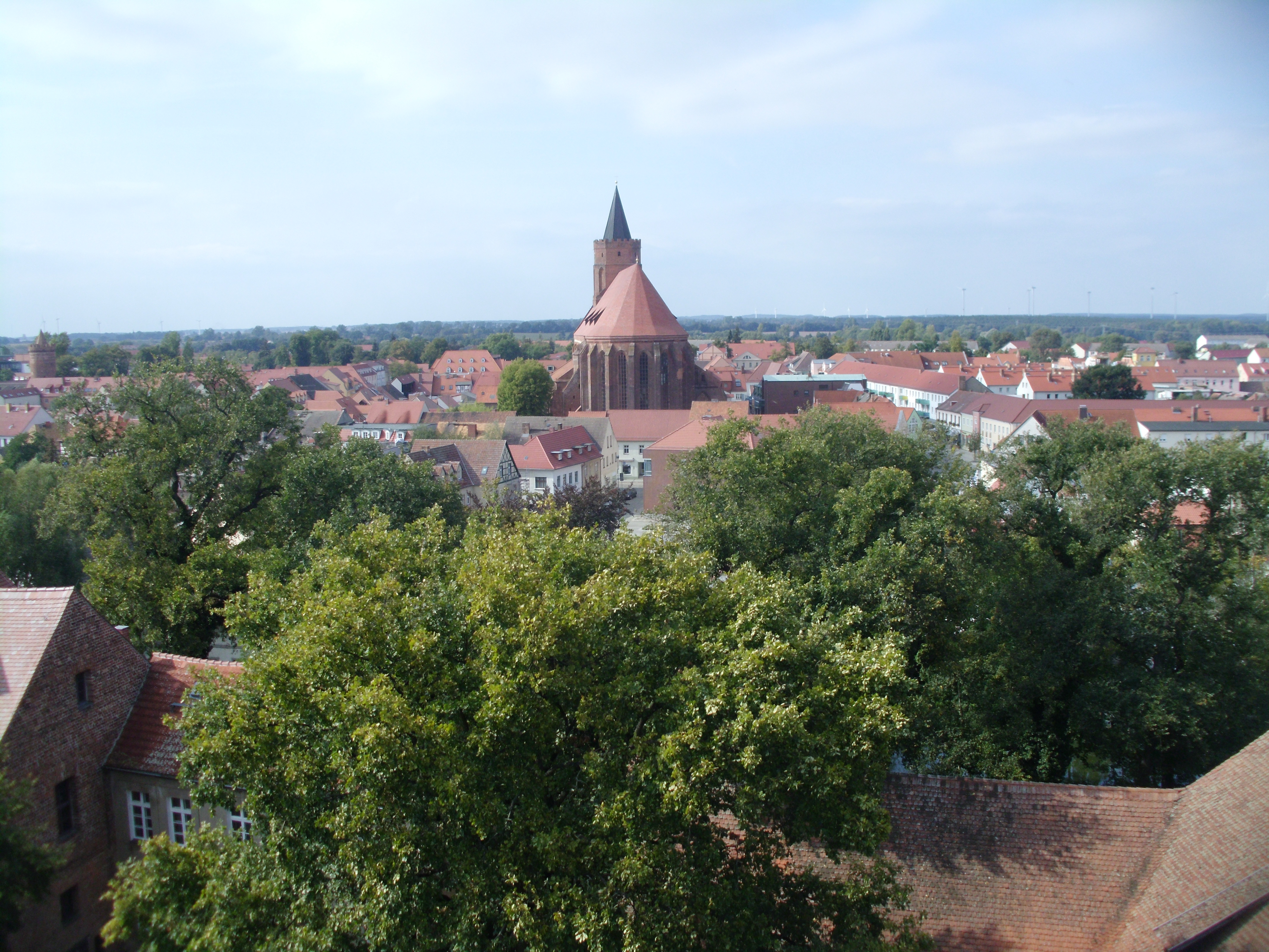 Blick vom Turm der Burg Beeskow, auf die St.-Marien-Kirche in Beeskow, Landkreis Oder-Spree, Brandenburg, Germany